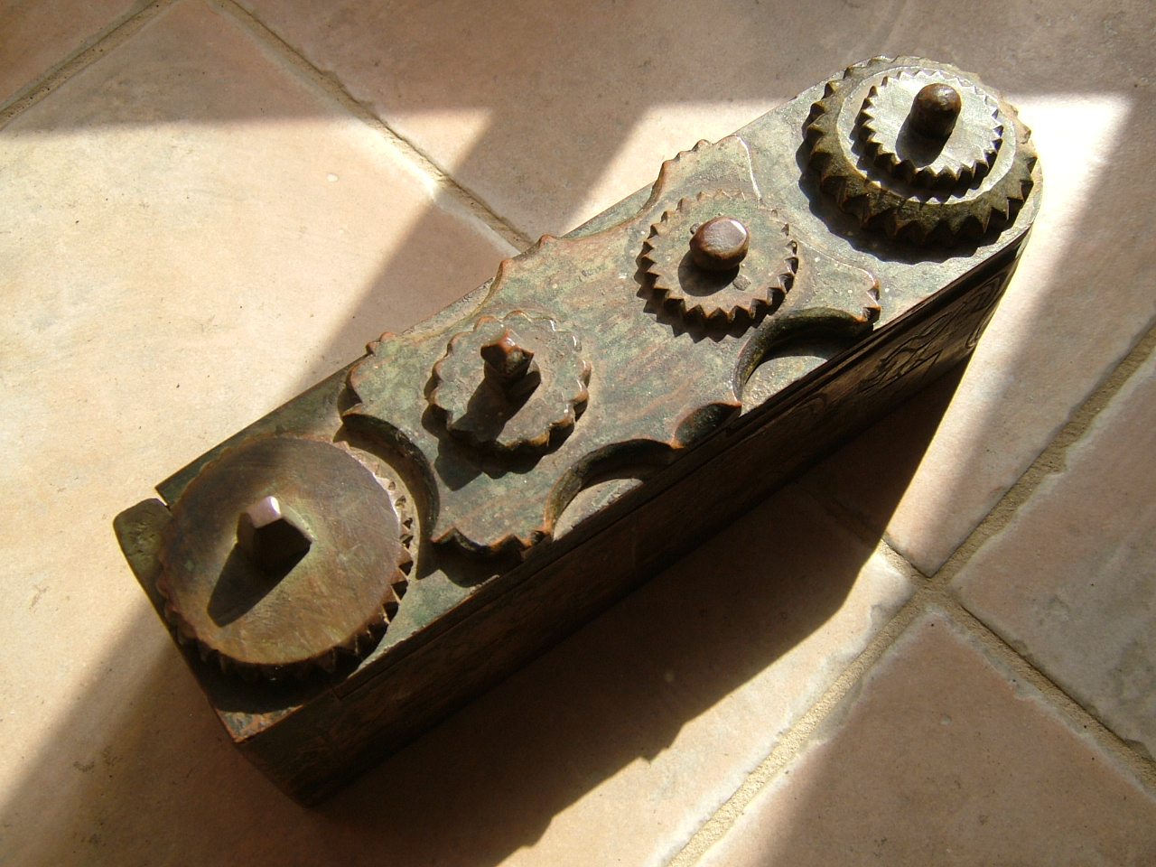 Boite à secret Auvergne